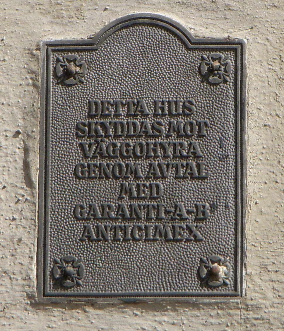 Gammal Anticimex-skylt på fastighet vid Skeppsbron i Stockholm